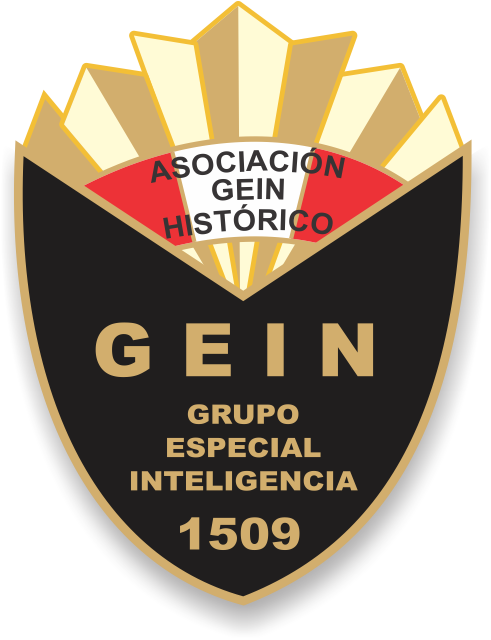 Este es el logo actual aprobado por la Asociación Grupo Especial de Inteligencia - GEIN - histórico.